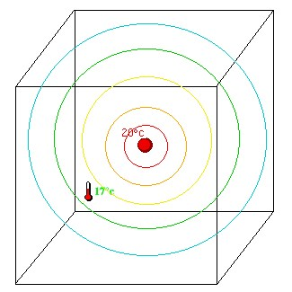 Illustration pour l'assimilation de données (Wikipedia France).